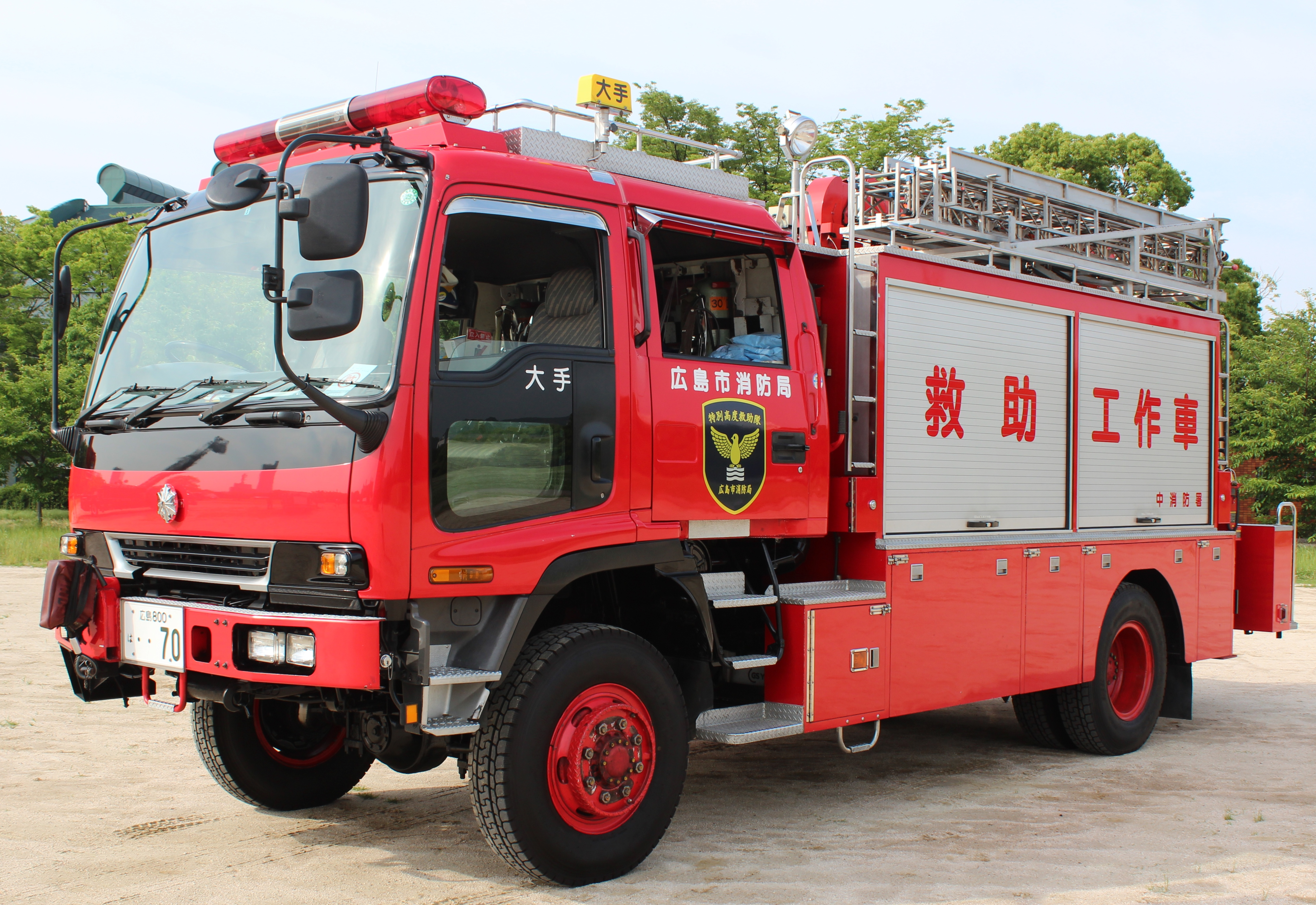 広島市消防局中消防署 救助工作車 いすゞ・フォワード 写生大会にて